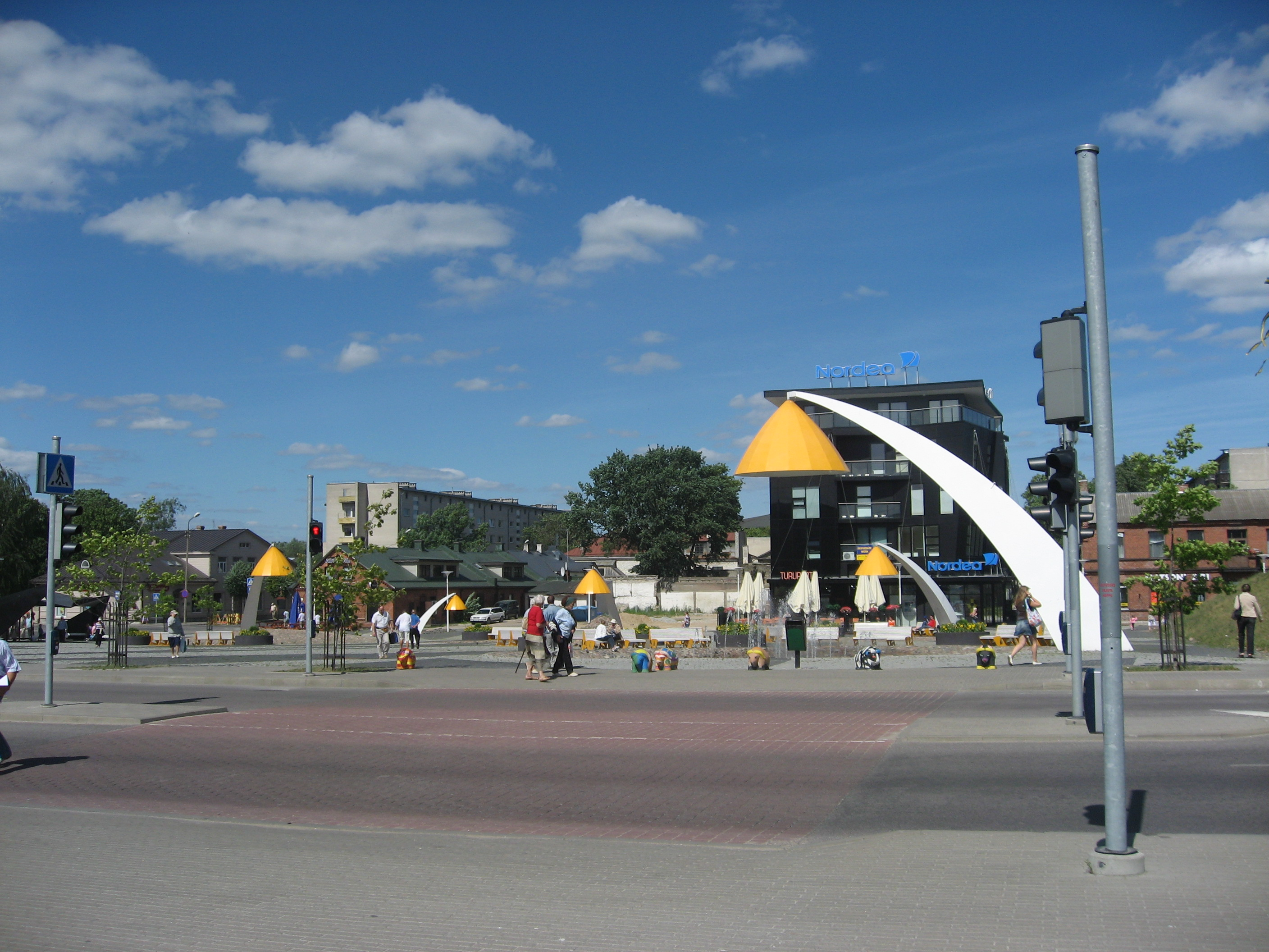 RakvereEesti: Rakvere